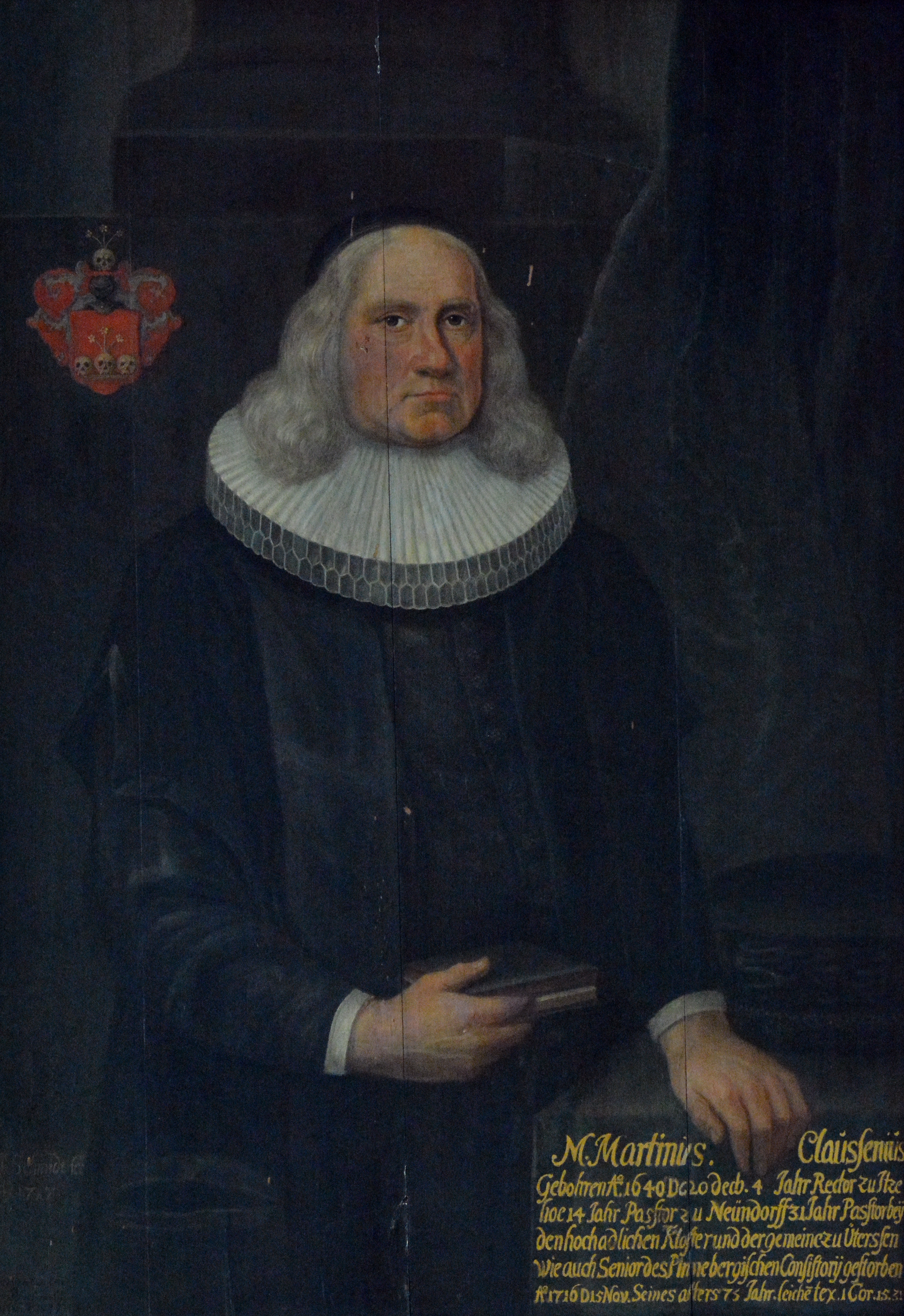 Martin Clausen (Auch: Hn. Mag. Clausenius) (* 20. Dezember 1640 in Kellinghusen; † 18. Dezember 1716 in Uetersen) war ein evangelischer Geistlicher und Senior.